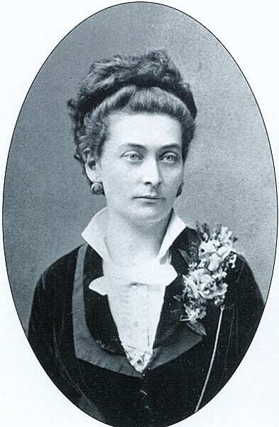 Hugonnai Vilma grófnő, az első magyar orvosnő portréja. 1890 körül ksézült fénykép